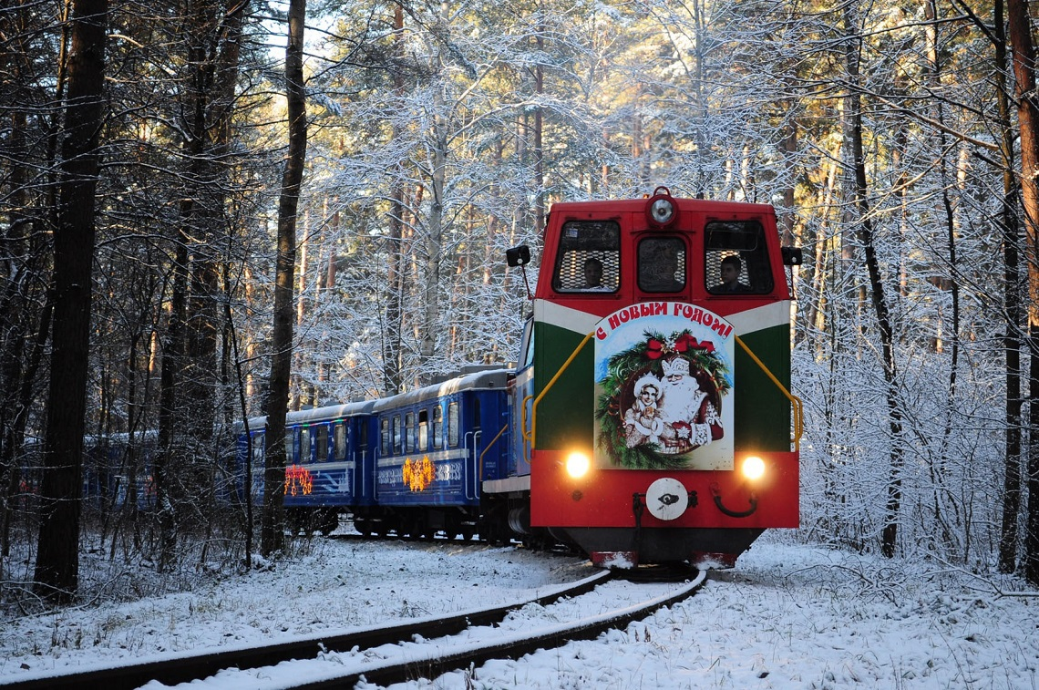 Зимний Экспресс на Минской детской железной дороге